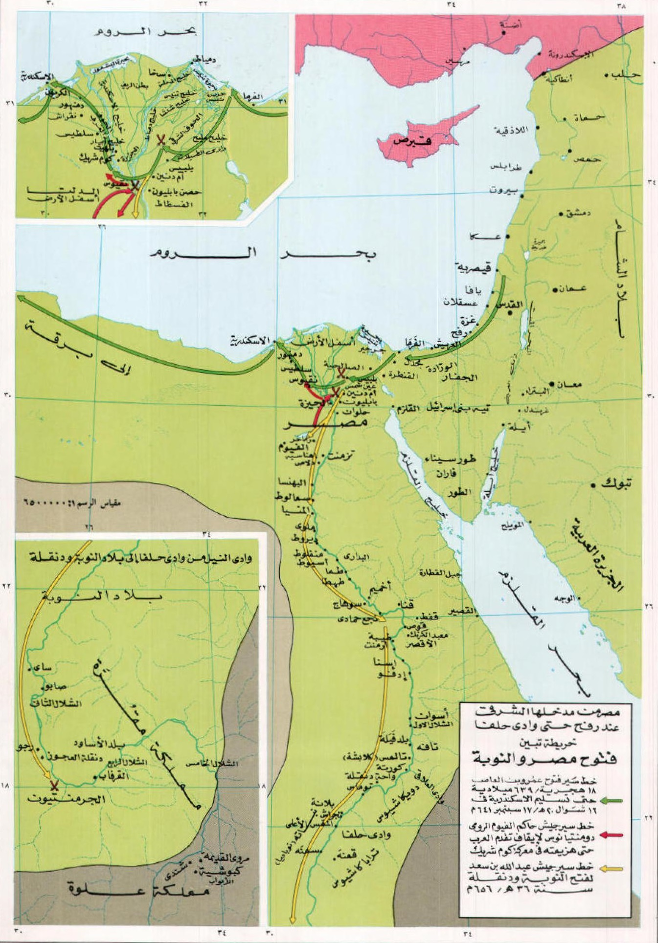 خارطة تُظهر مسير الجُيوش الإسلاميَّة وفتحها بلاد مصر والنوبة.